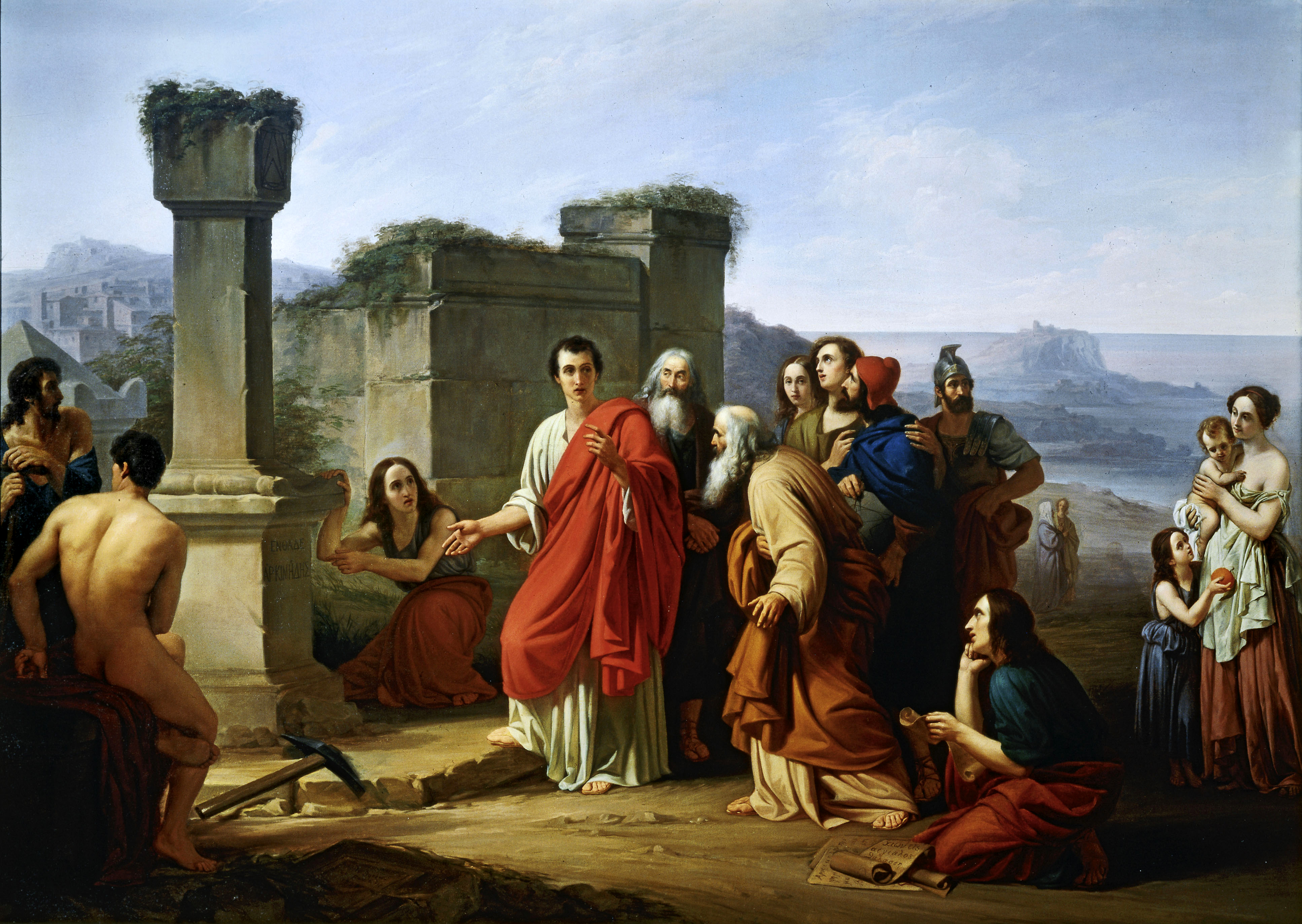 Dipinto del pittore Paolo Barbotti (1821-1867), raffigurante la scena di Cicerone mentre scopre la tomba di Archimede dimenticata dai siracusani.